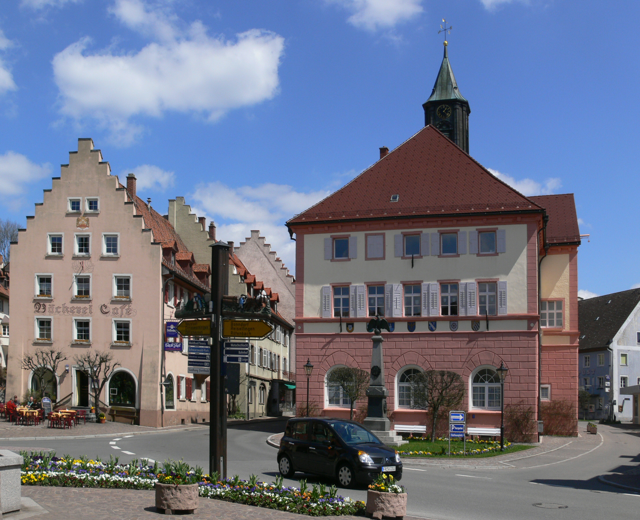 Löffingen, Landkreis Breisgau-Hochschwarzwald Rathaus (rechts) am Rathausplatz